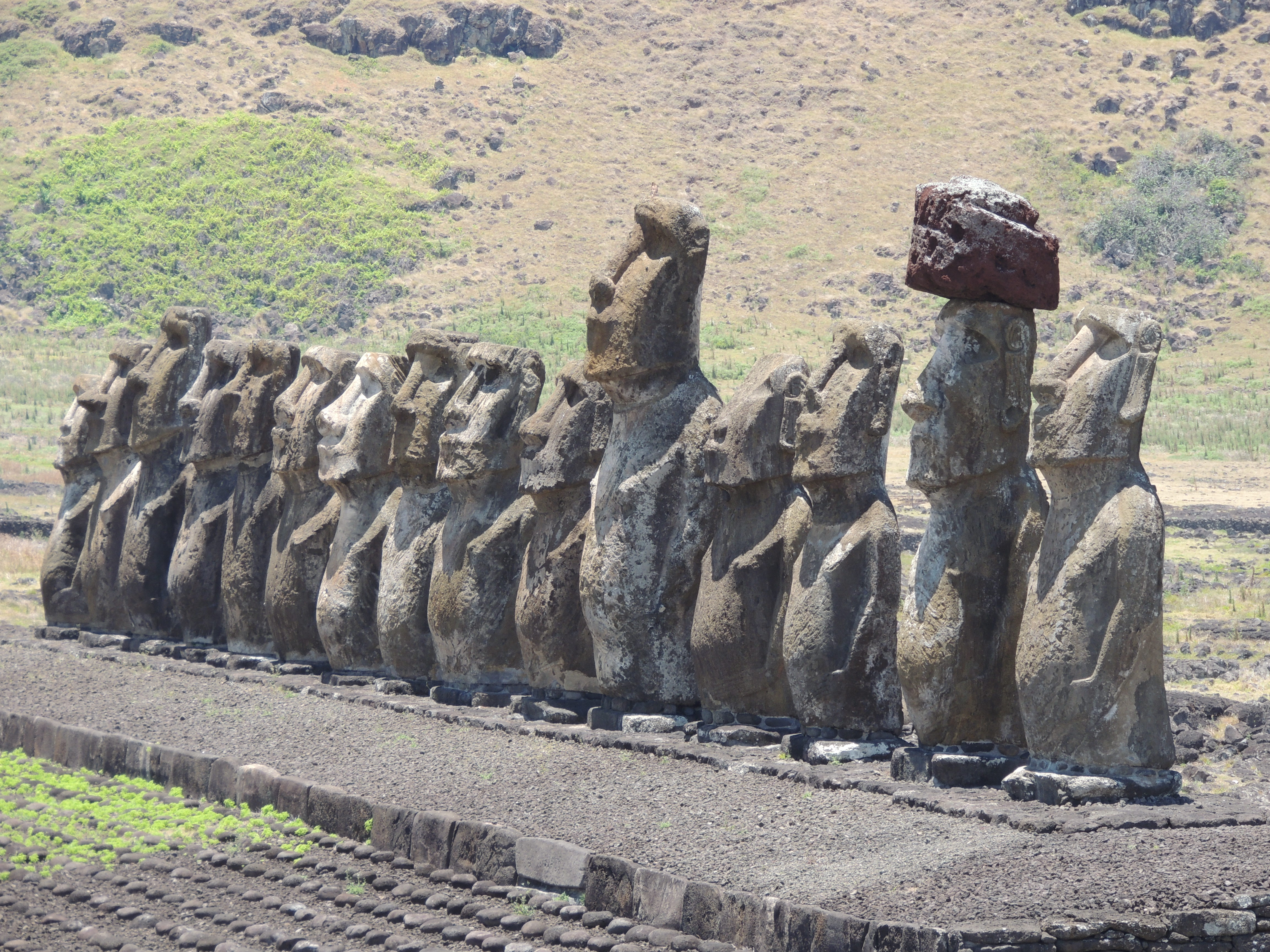 Ahu Tongariki es el asentamiento de moais más importante en cuanto a tamaño y situación en Rapa Nui. Se encuentra en la costa este de la isla, a unos 20 kilómetros de la capital Hanga Roa, entre las calas de Hanga Nui y Hanga Hotu Iti. Esta es una especie de altar, una plataforma compuesta por 15 moais alineados de forma paralela a la costa, dando la espalda al mar, ya que prácticamente todos los moais de la isla miran hacia el centro de la misma.